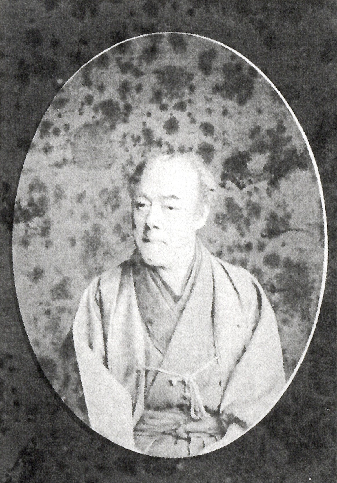 加藤明軌の肖像写真。